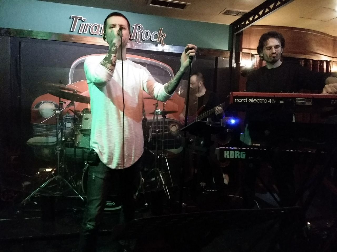 Eugent Bushpepa